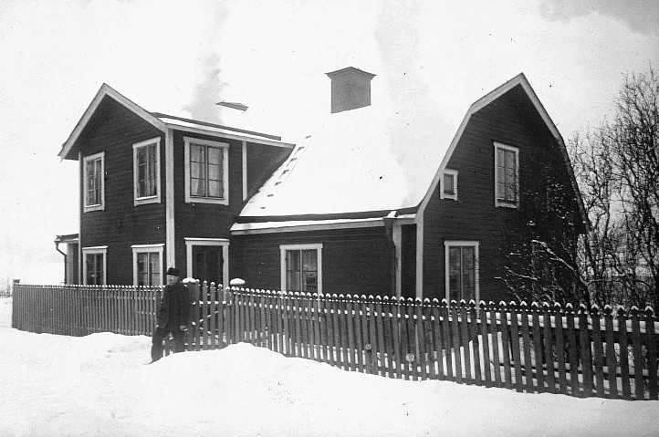 Bromstens gård huvudbyggnad som revs sommaren 1964 för att ge plats för mer trafik på Duvbovägen.